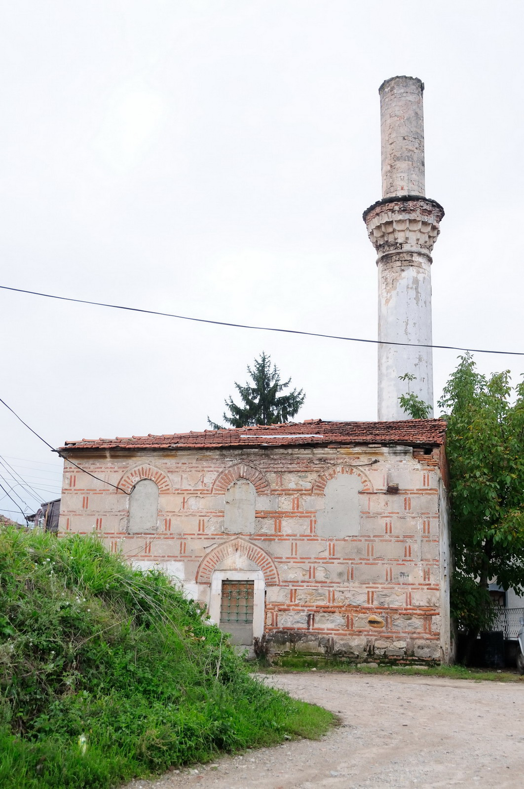 Djamija Kodja Kadi-Bitola